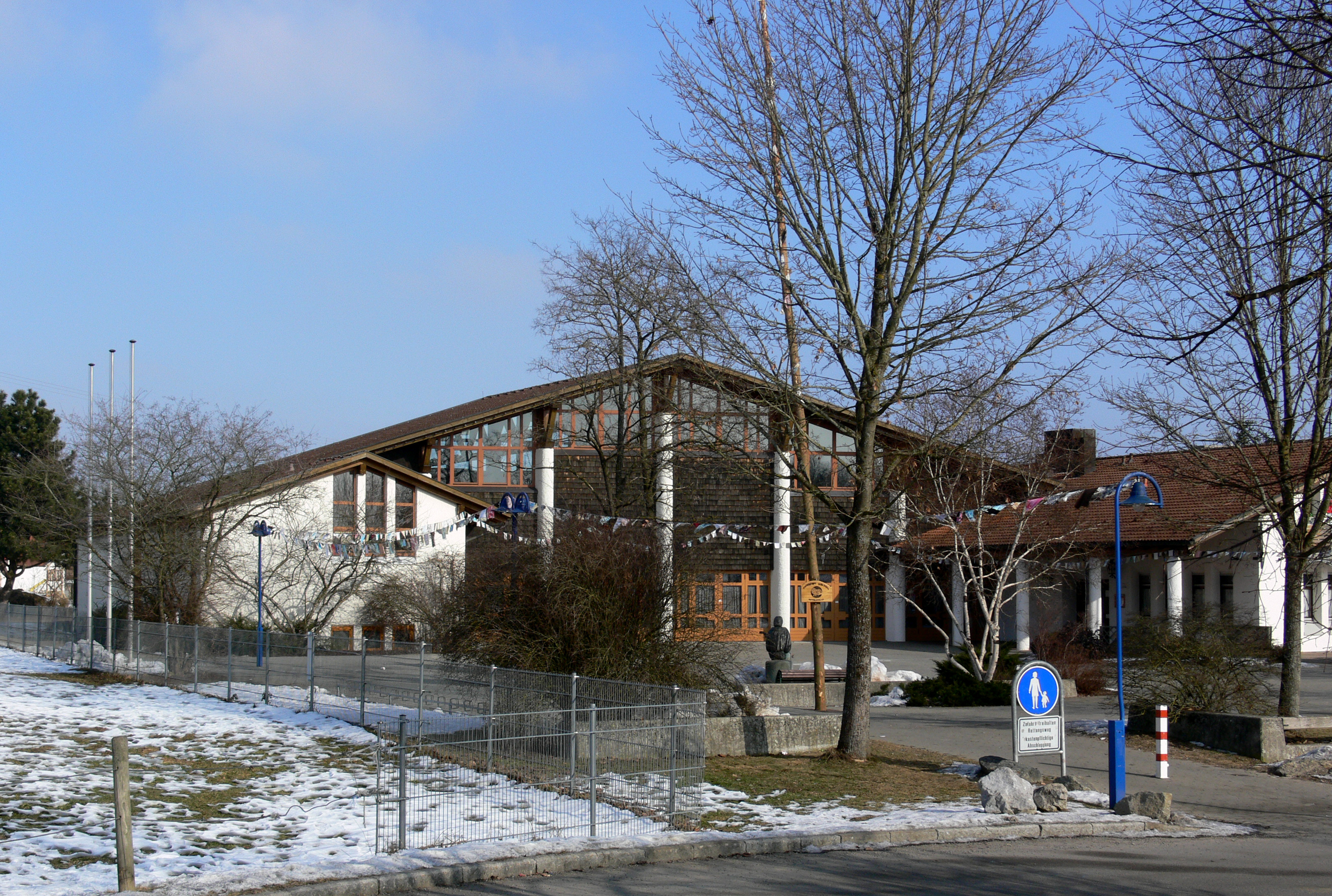 Ravensburg, Schmalegg: Ringgenburghalle (Sport- und Mehrzweckhalle mit Restaurant)